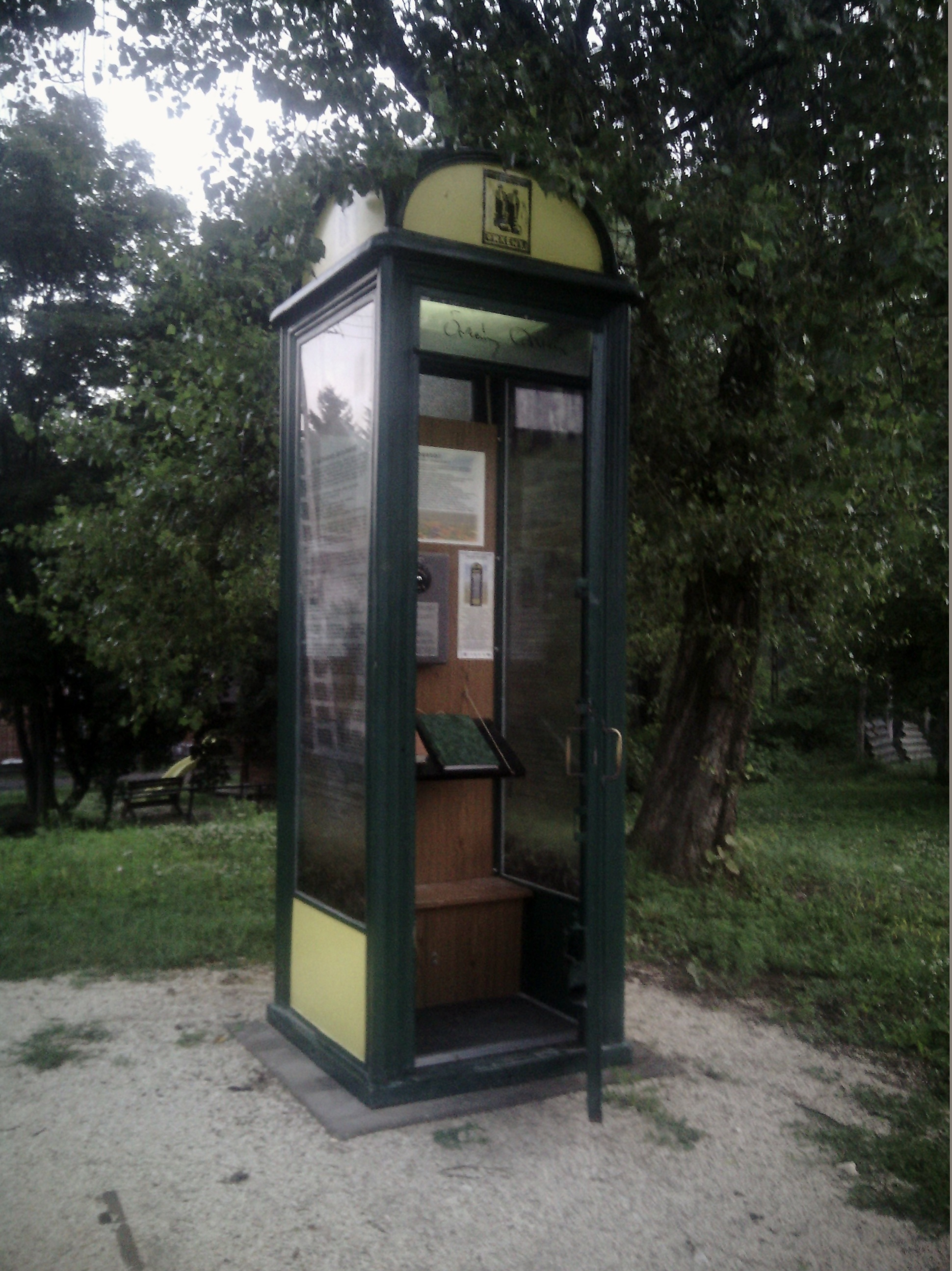 Örkény István emlékműve, Remeteszőlős